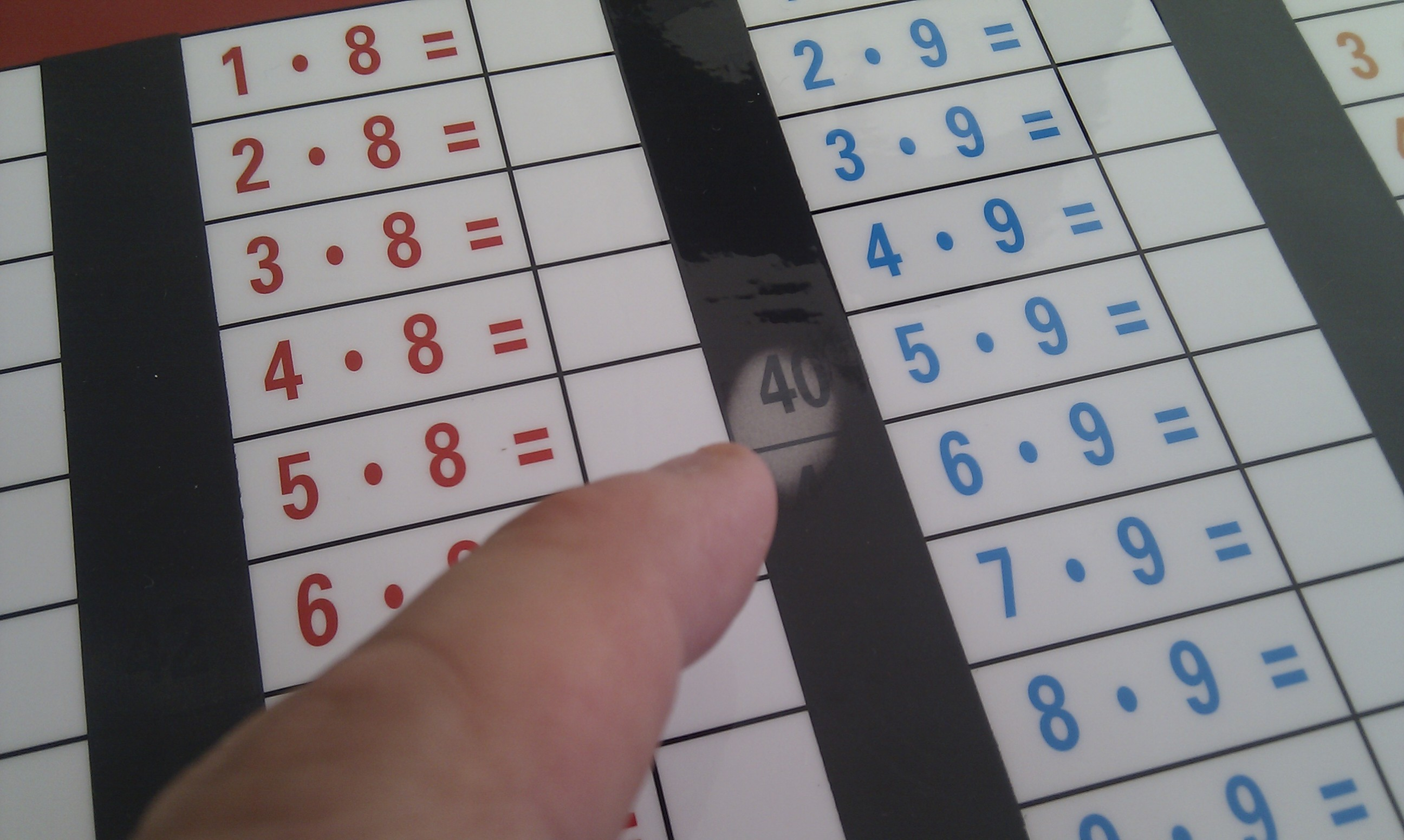 Didactisch materiaal voor het automatiseren van de tafels van vermenigvuldiging. Het antwoord verschijnt door de warmte van de vinger.